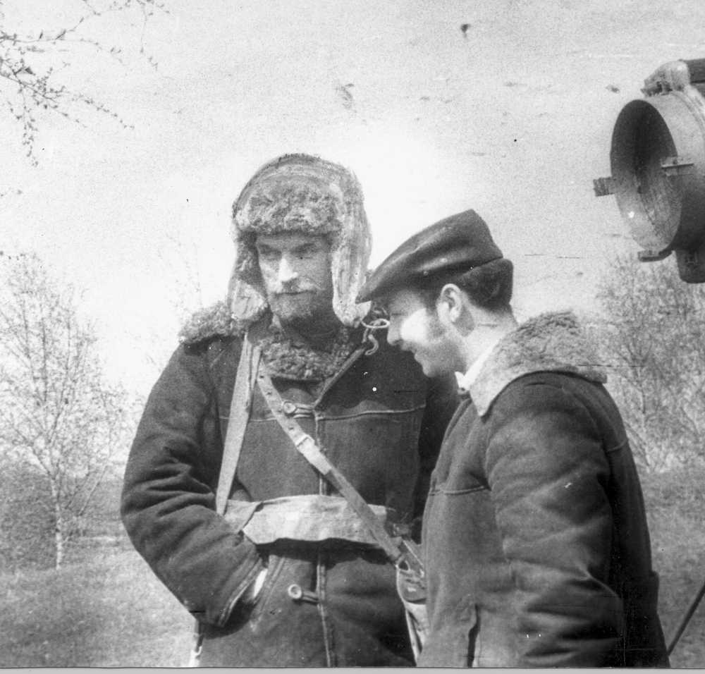 Артист Николай Владимирович Олялин в роли лесника Серафима в перерыве между съёмками кинофильма «Ливень» близ города Переславля.